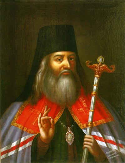 Епископ Парфений (Сопковский)